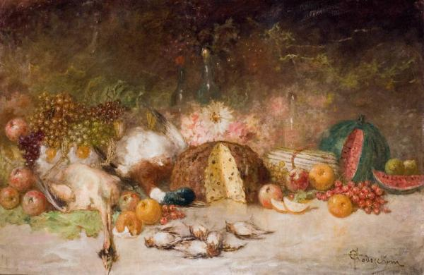 Natura morta, olio su tela, Musei civici di Lecco